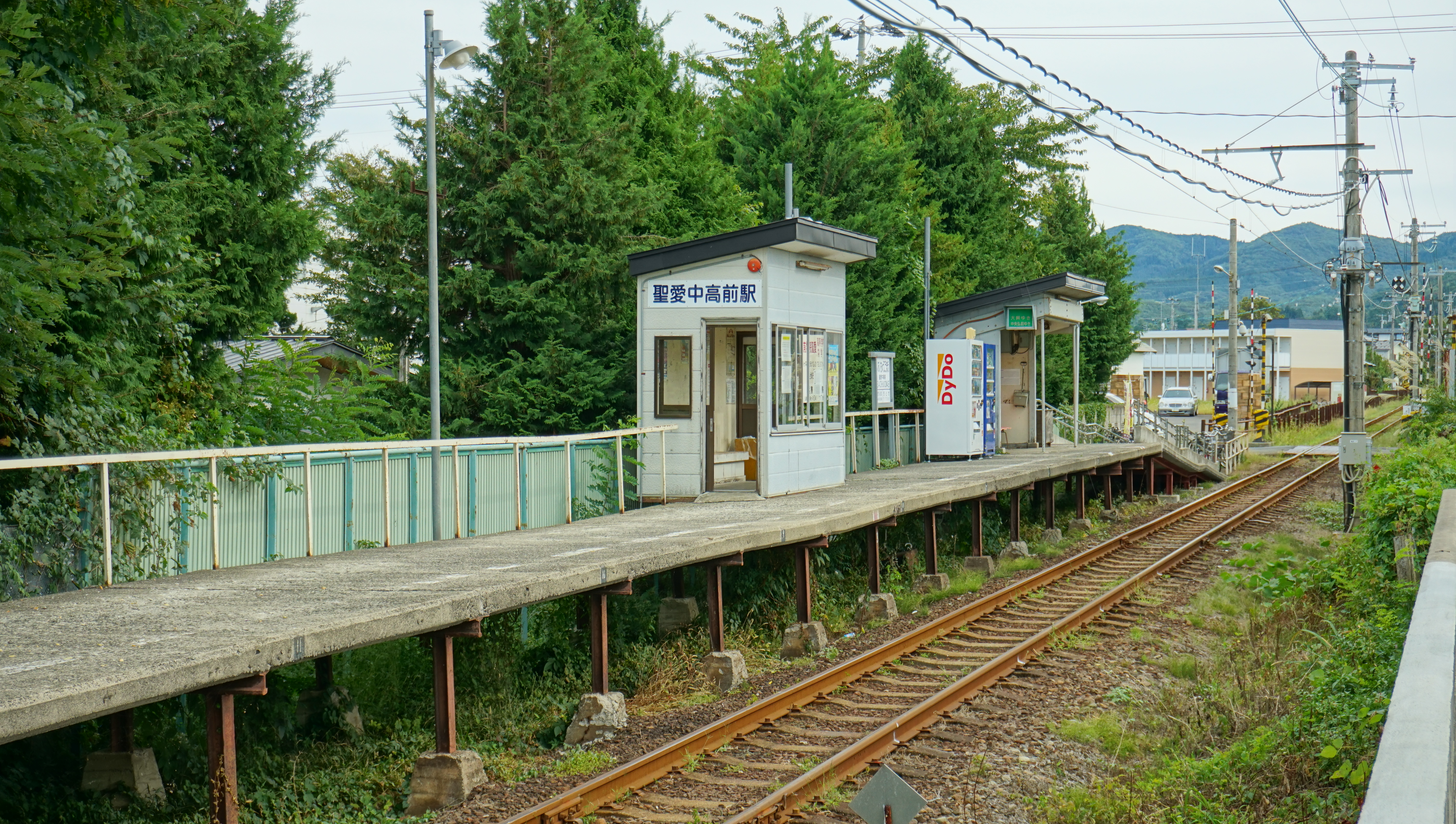 弘南鉄道大鰐線・聖愛中高前駅